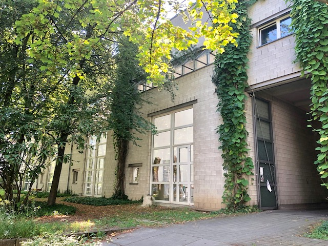 Die Bildhauerateliers der Kunstakademie Karlsruhe in der Bismarckstraße 67.